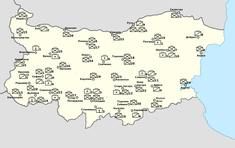 Мирновременно разположение на полковете на Българската армия в навечерието на Балканските войни